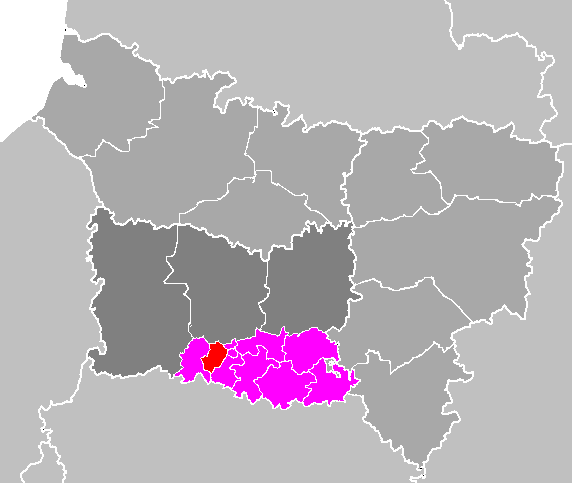 Maps of arrondissements and cantons of France: Département de l'Oise